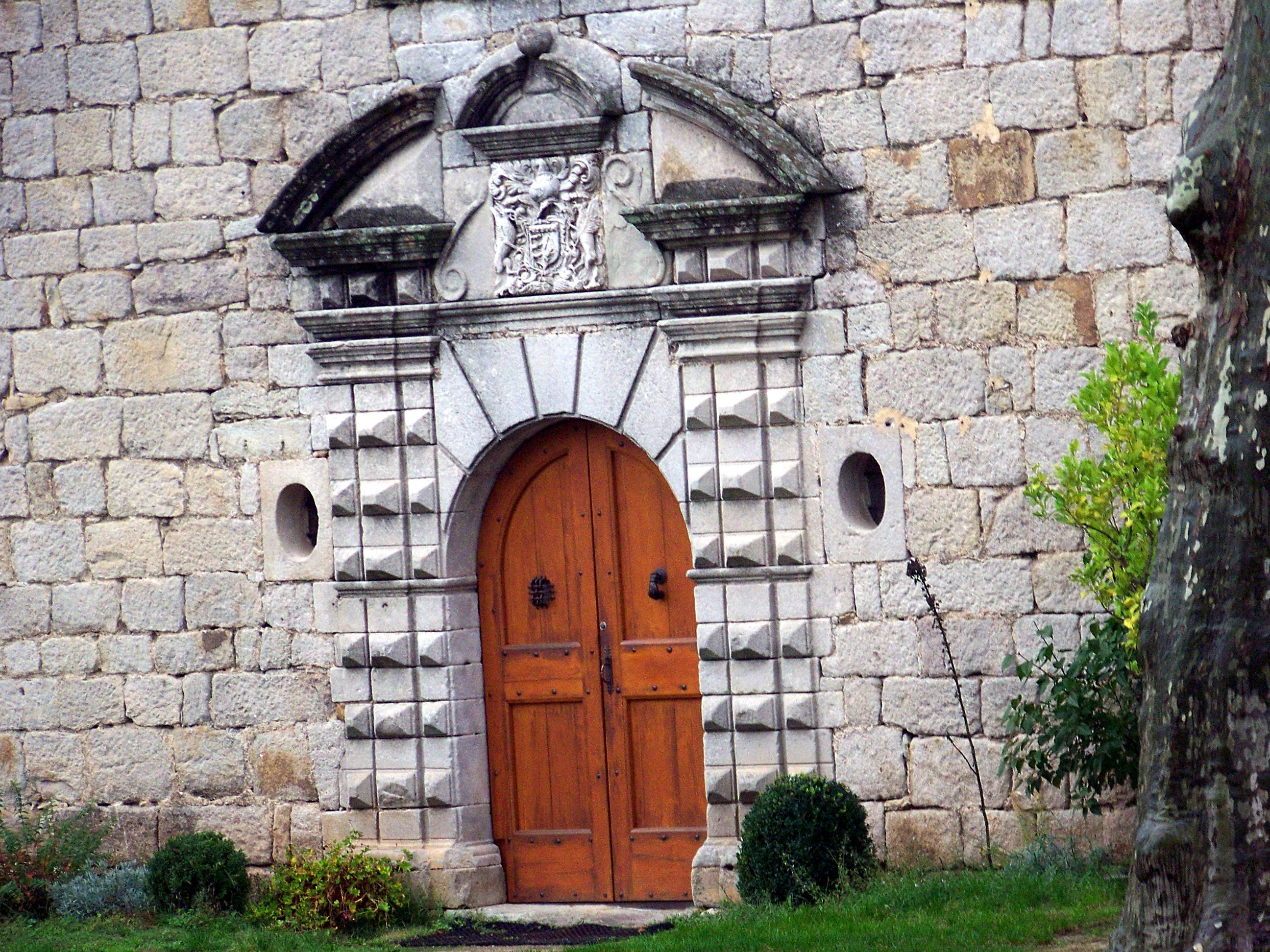 Portail du château de la Saumès à Lablachère(Ardèche)